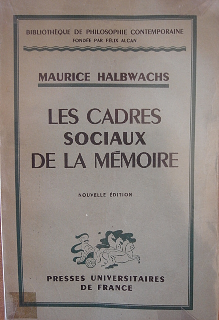 Couverture du livre de Maurice Halbwachs, Les Cadres sociaux de la mémoire, 2 édition